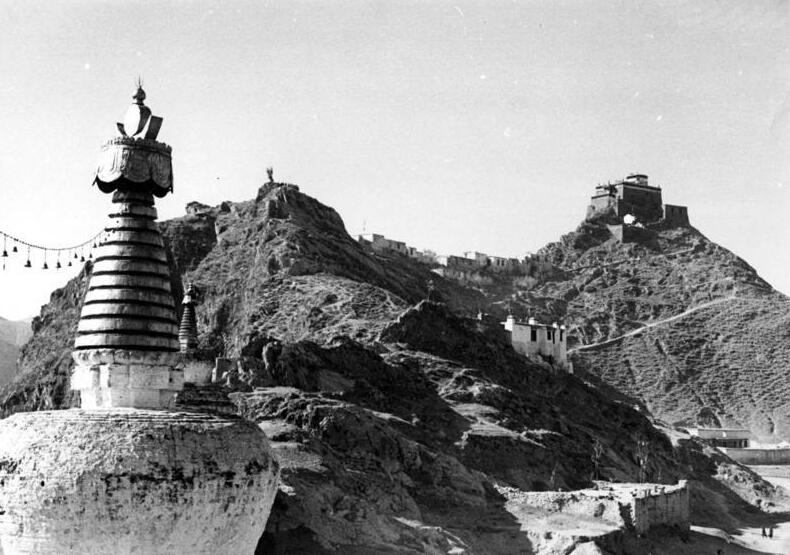 Lhasa, Medizinberg vom zweibeinigen Tschorten gesehen